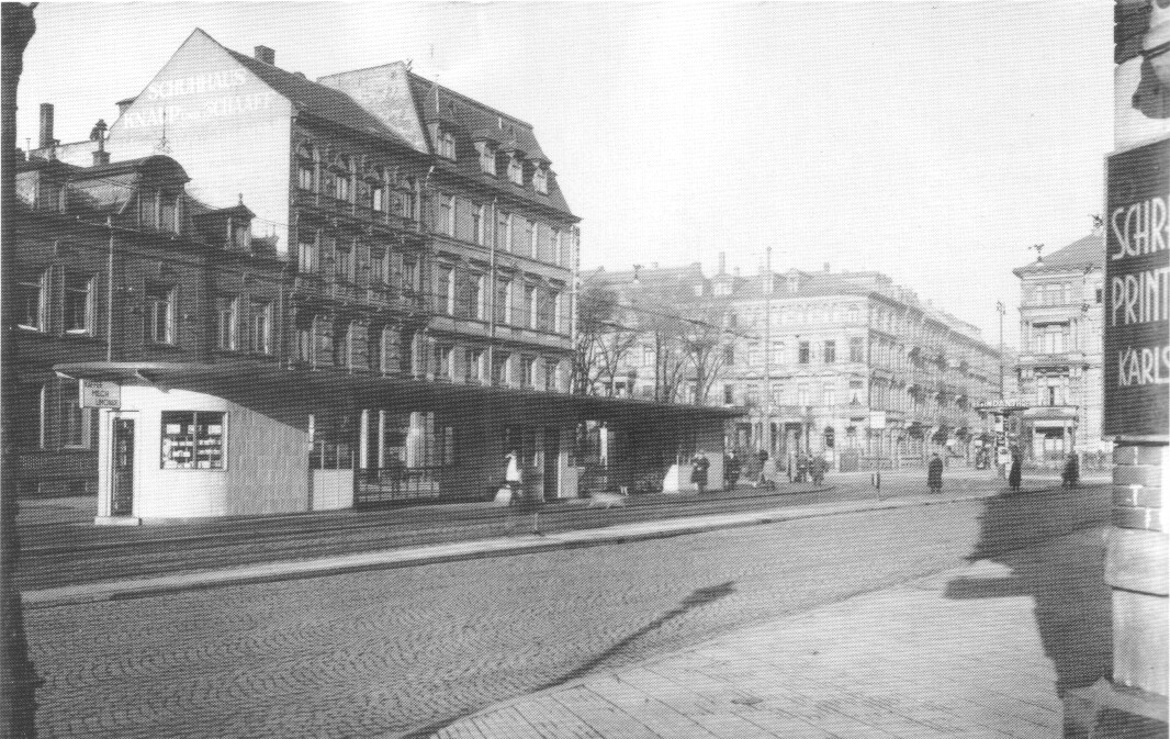 Mannheim-Oststadt, Tattersall, um 1930